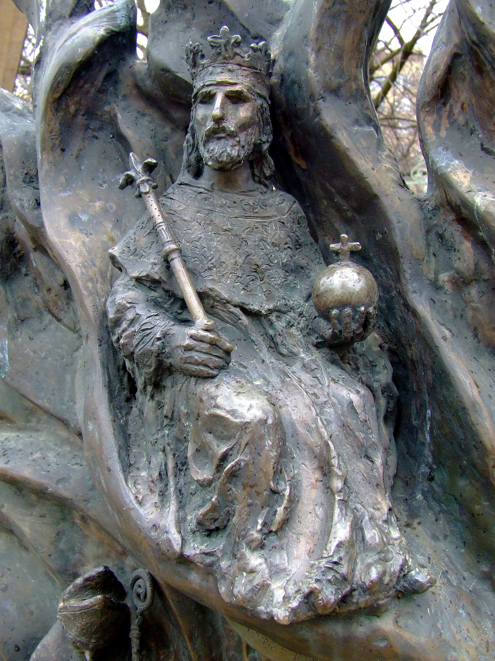 Nagy Lajos király portréja a Janus Pannonius Tudományegyetem díszkapuján. Trischler Ferenc szobrászművész alkotása